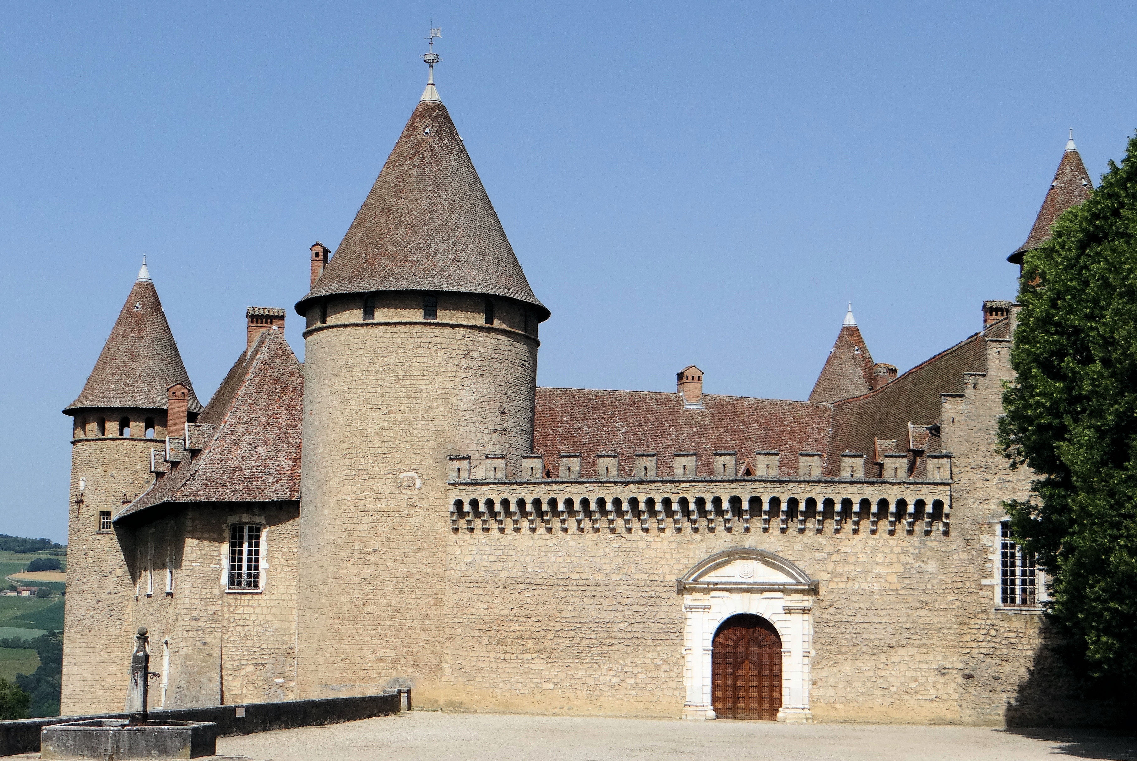 Château de Virieu Entrée du château